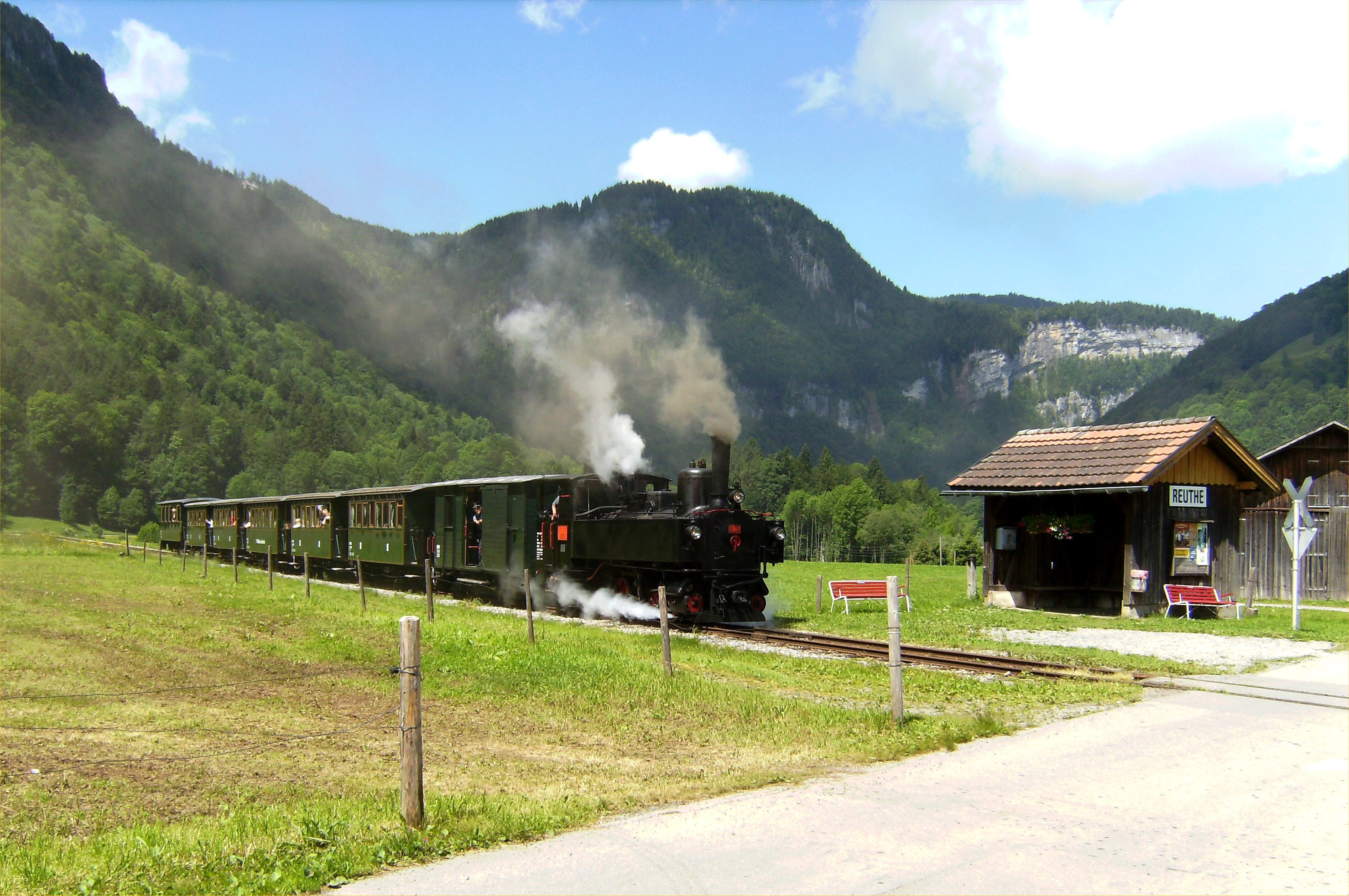 Die Museumsbahn Bregenzerwaldbahn, das "Wäldlerbähnle", beim original erhaltenen Haltestellenhäuschen aus der Gründerzeit der Bahn in Reuthe